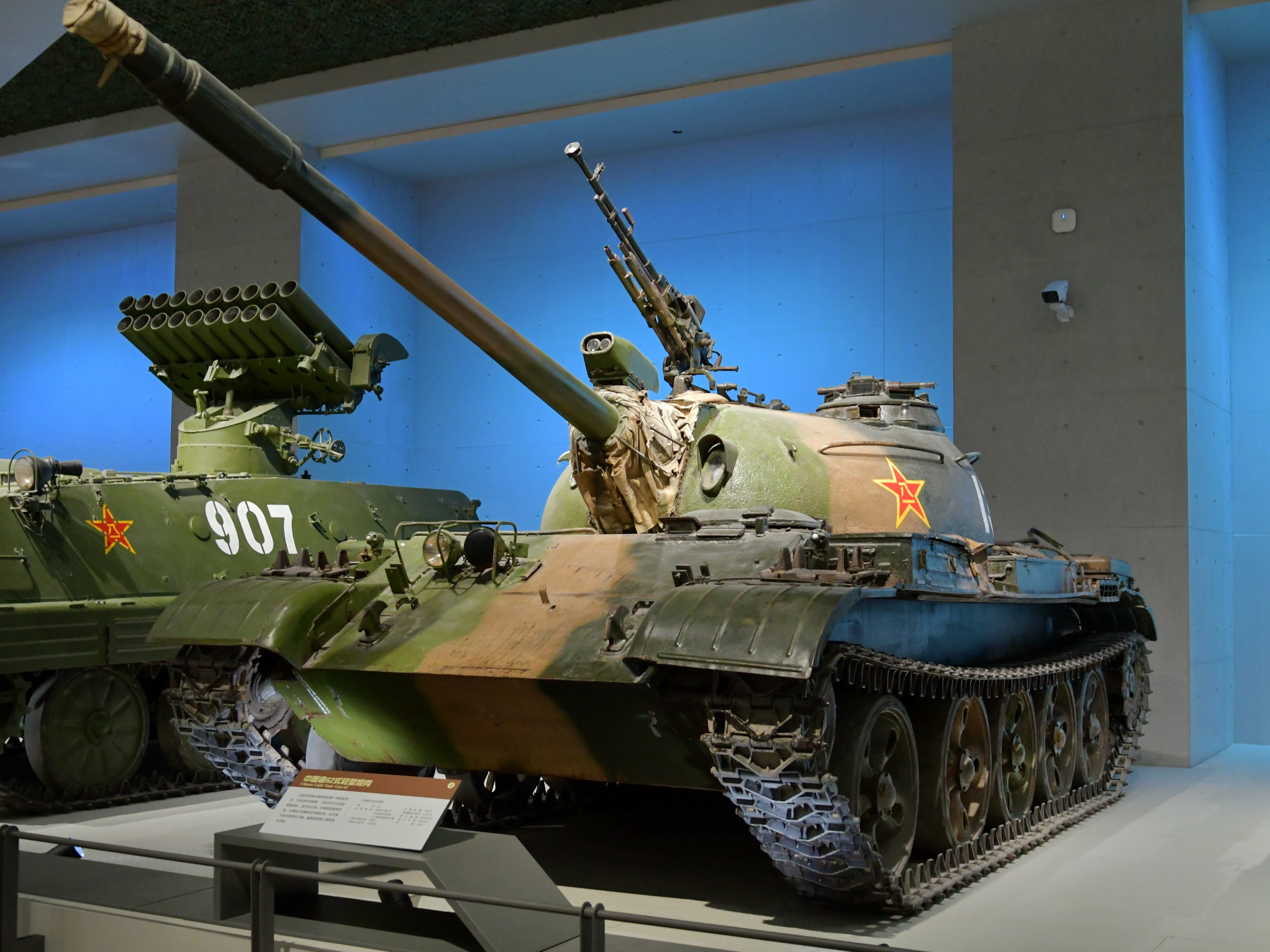 62式轻型坦克, 保存在中国人民革命军事博物馆.